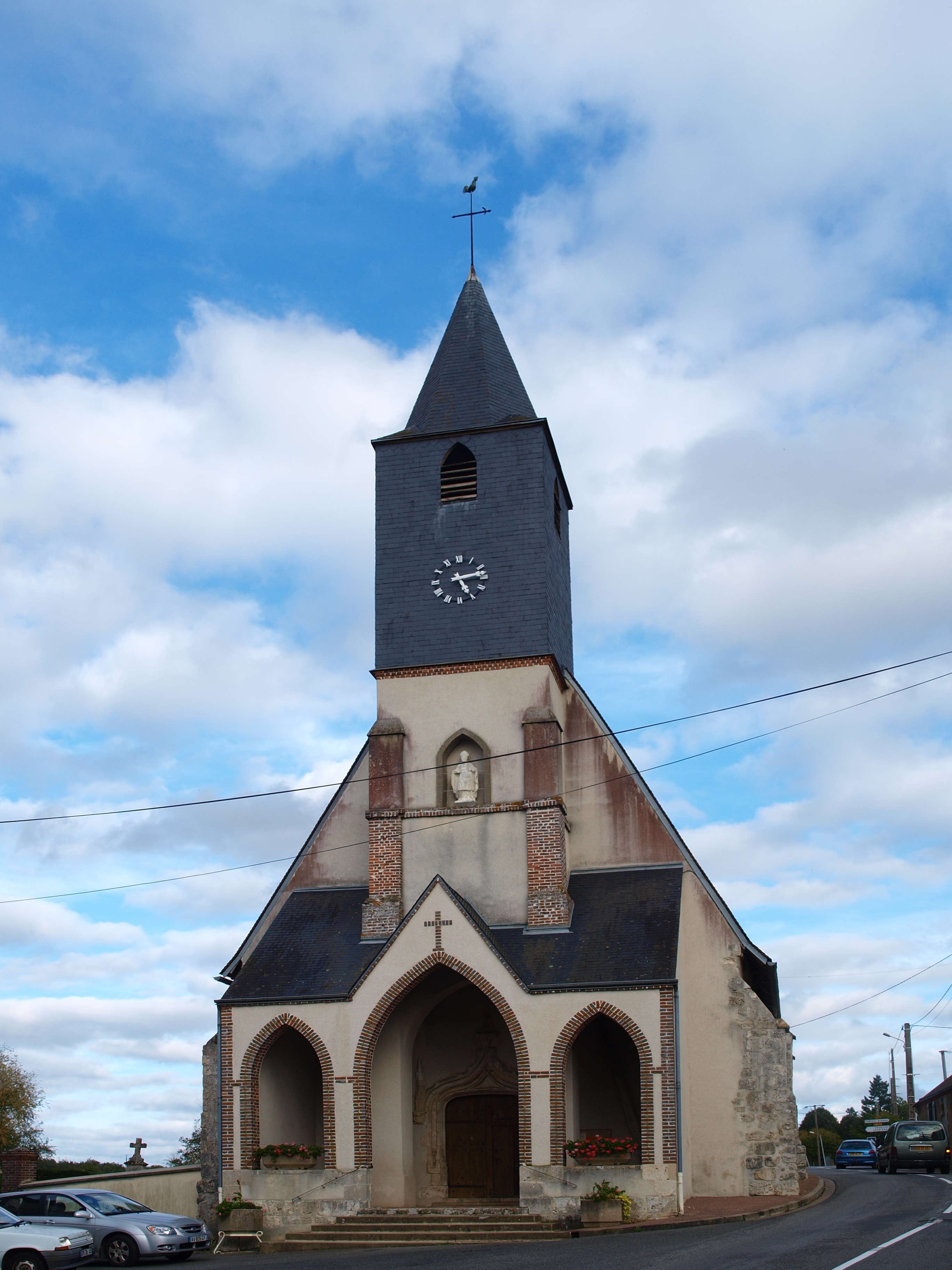 Saint-Firmin-des-Bois (Loiret, France) ; l'église